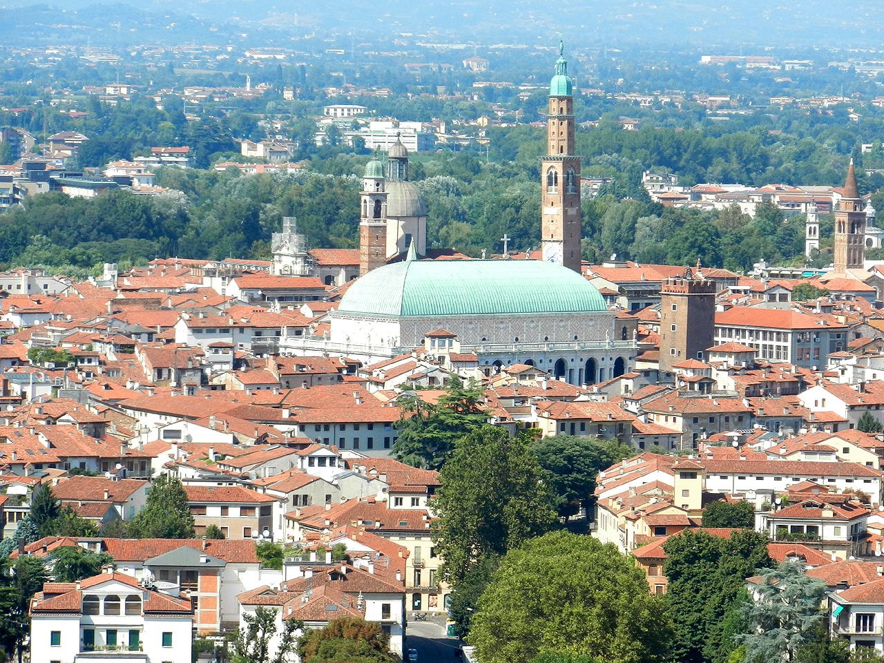 Vicenza - Basilica Palladiana vista dal Santuario di Monte Berico